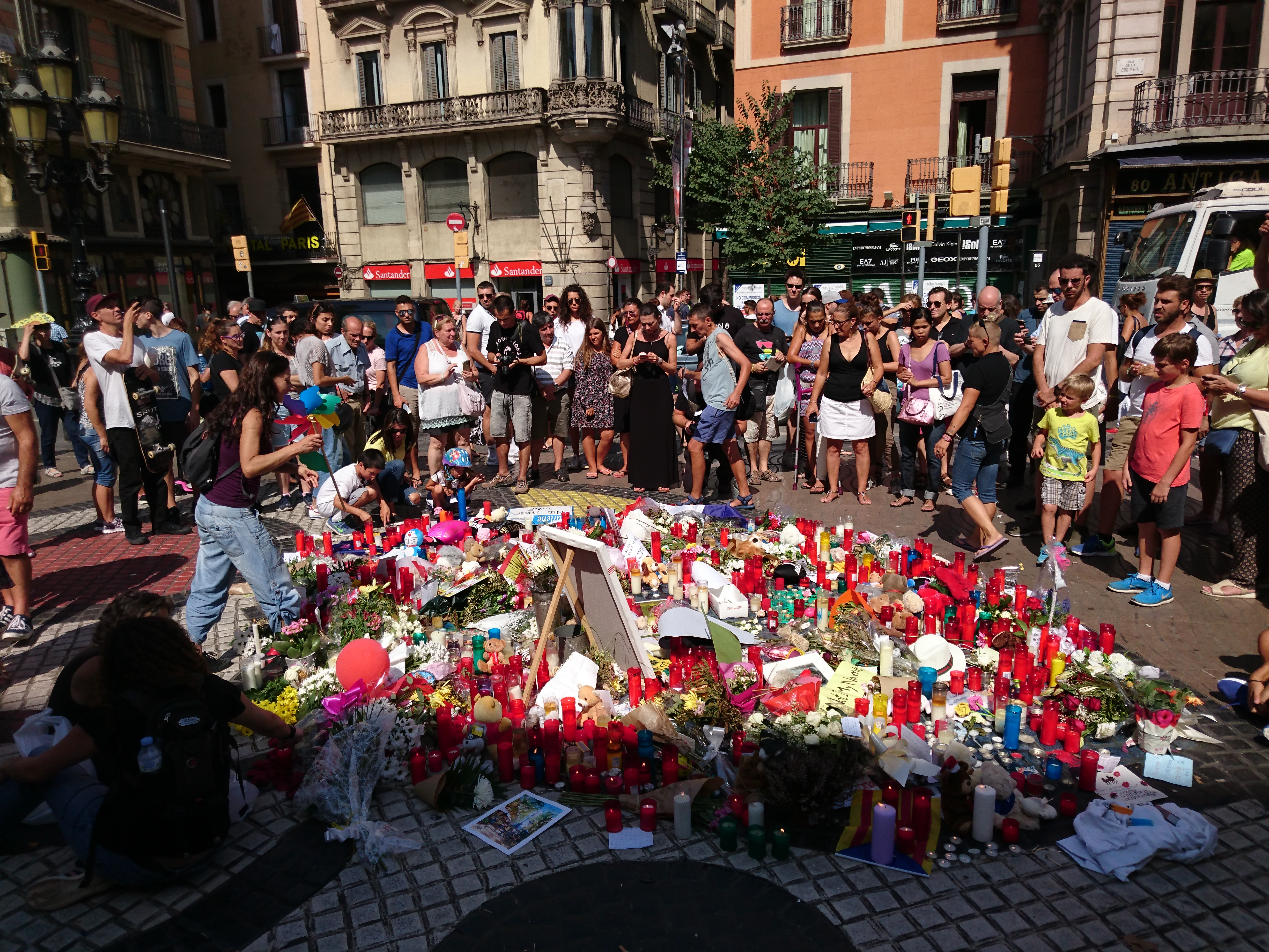 Հարգանքի տուրք Լա Ռամբլա փողոցում